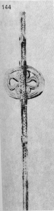 144. Хурка на баба Мариница Тутната от гр. Тетевен; направена е от лесково дърво преди 30-40 години. Къжелът е елипсовиден и е вмъкнат В цепнатината на тояжката; направен е от тънка лескова лента, която е навита в елипсата така, че образува четирикрилен кръст. Тояжката на хурката е нашарена с малки триъгълничета, рязани с ножче. Размери на къжела: 10x8,5x0,5 см. Скицирана от оригинала през юли 1916 г. (Т. 2, обр. 166.)